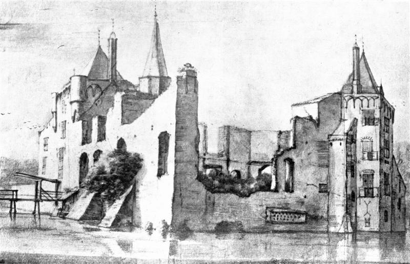 Castle Zuidwijk by R. Roghman